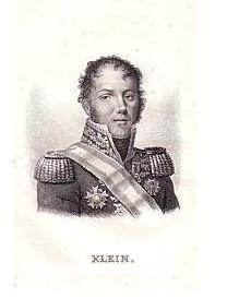 Gravure représentant le général-comte Dominique Louis Antoine KLEIN (collection particulière). William Coolidge Lane, A.L.A. portrait index: index to portraits contained in printed form, New York, B. Franklin [196-?] p. 806, maintains it was engraved by "Tardeiu".